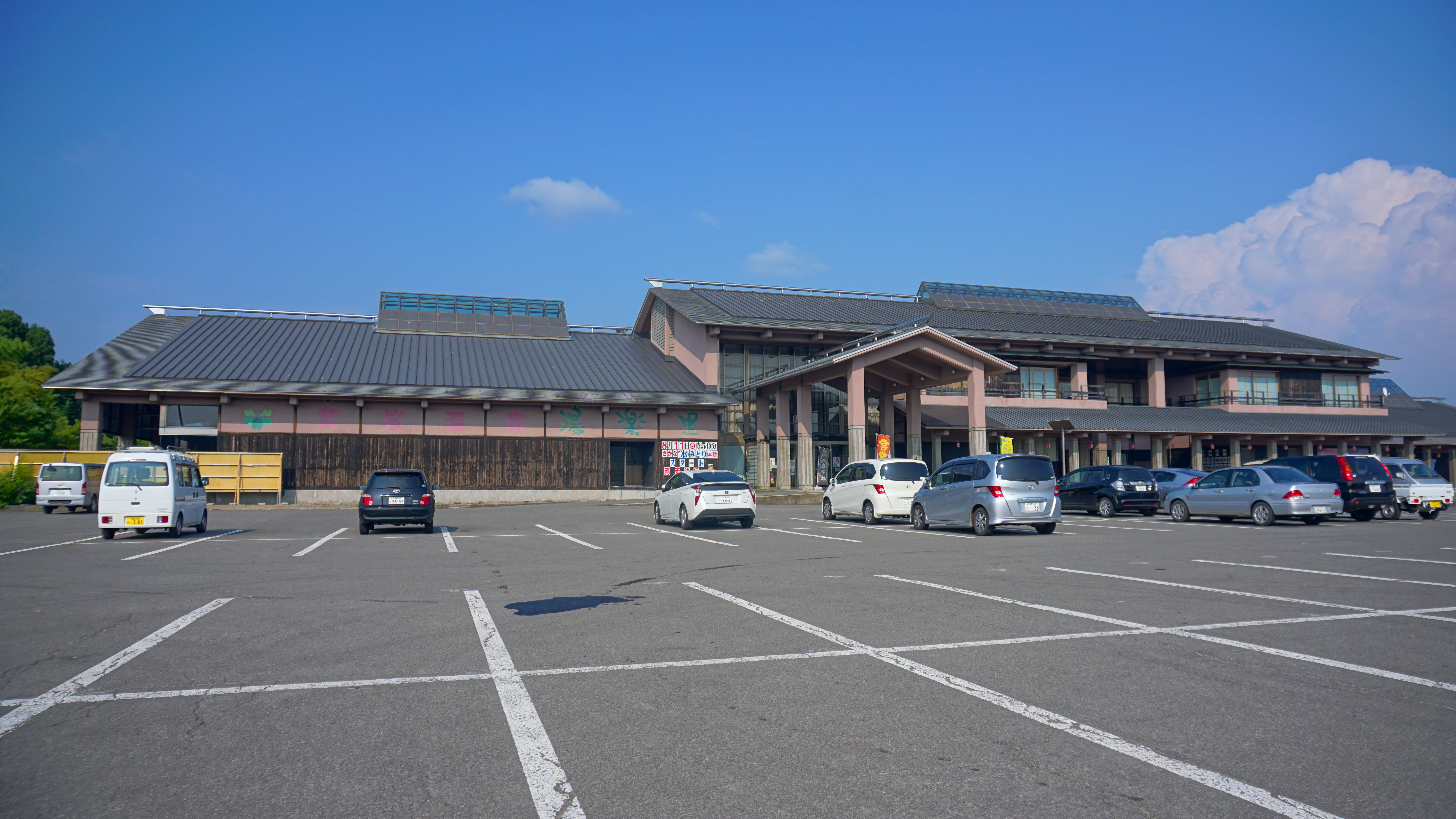 道の駅東由利、日帰り入浴施設「湯楽里」